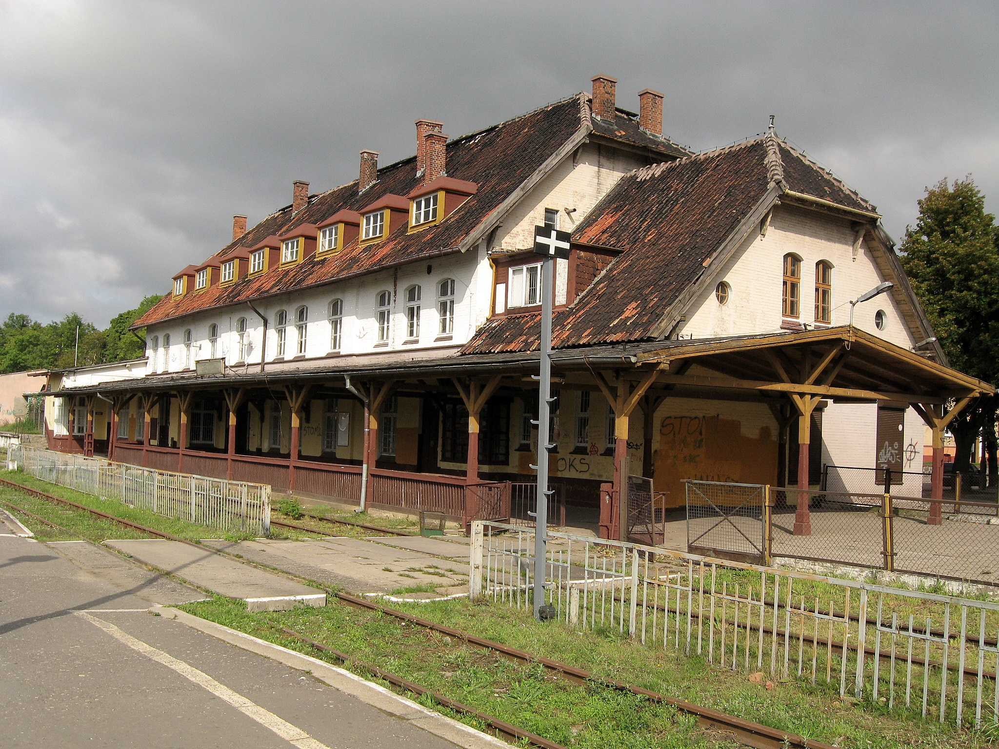 Budynek stacji w Szczytnie